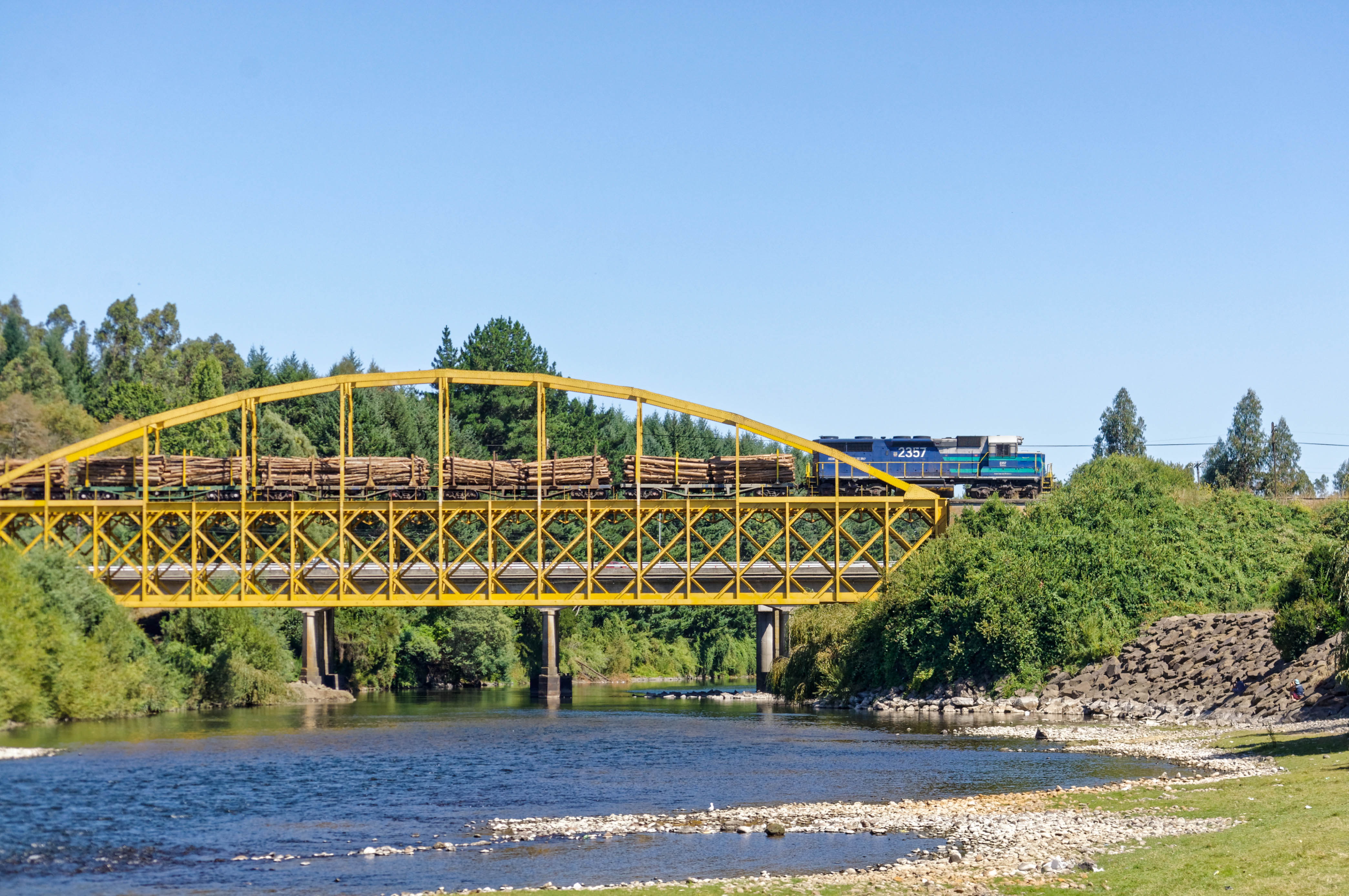 Los rios en el sur son otra cosa, hasta el rio mas pequeño le pone color a los paisajes. Tren palero Loncoche - Nacimiento pasando por el Puente sobre el Rio Quepe. Febrero, 2016